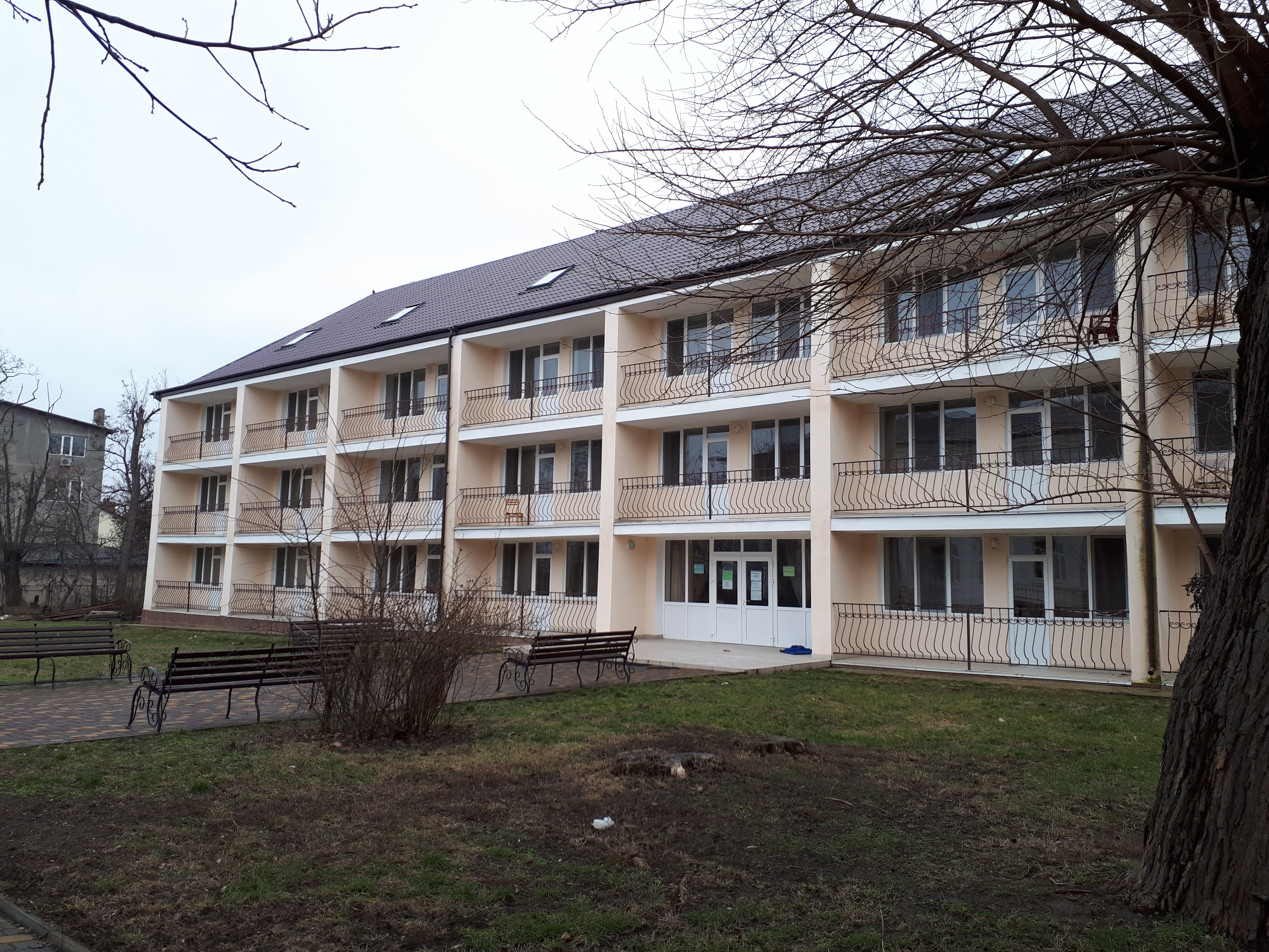 Один из корпусов санатория